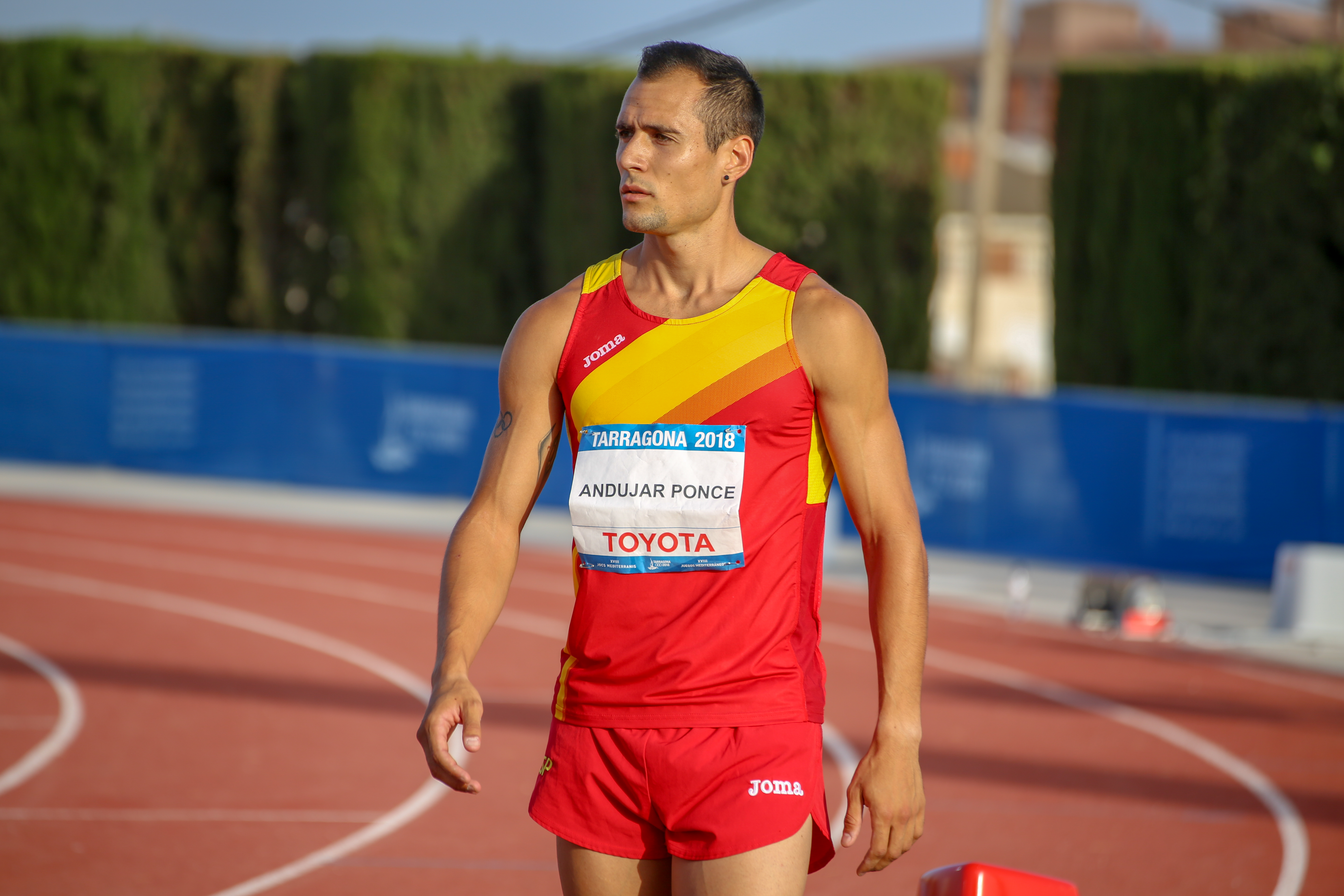 Daniel Andújar en los 800 metros de los Juegos del Mediterráneo 2018